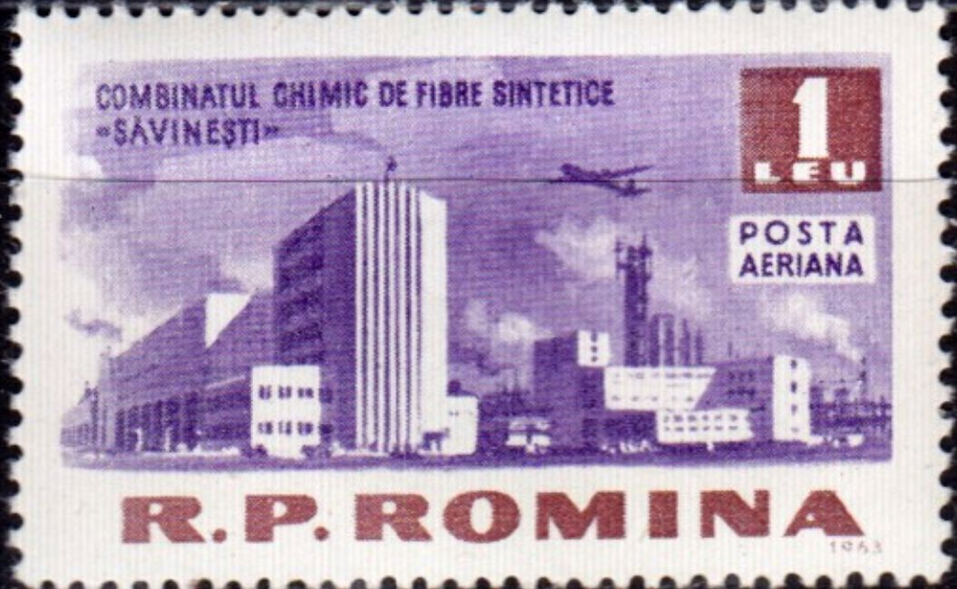 Dimitrie Stiubei - Combinatul Chimic de Fibre Sintetice Savinesti